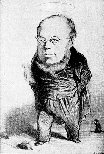 Pierre-Joseph Proudhon (caricature)